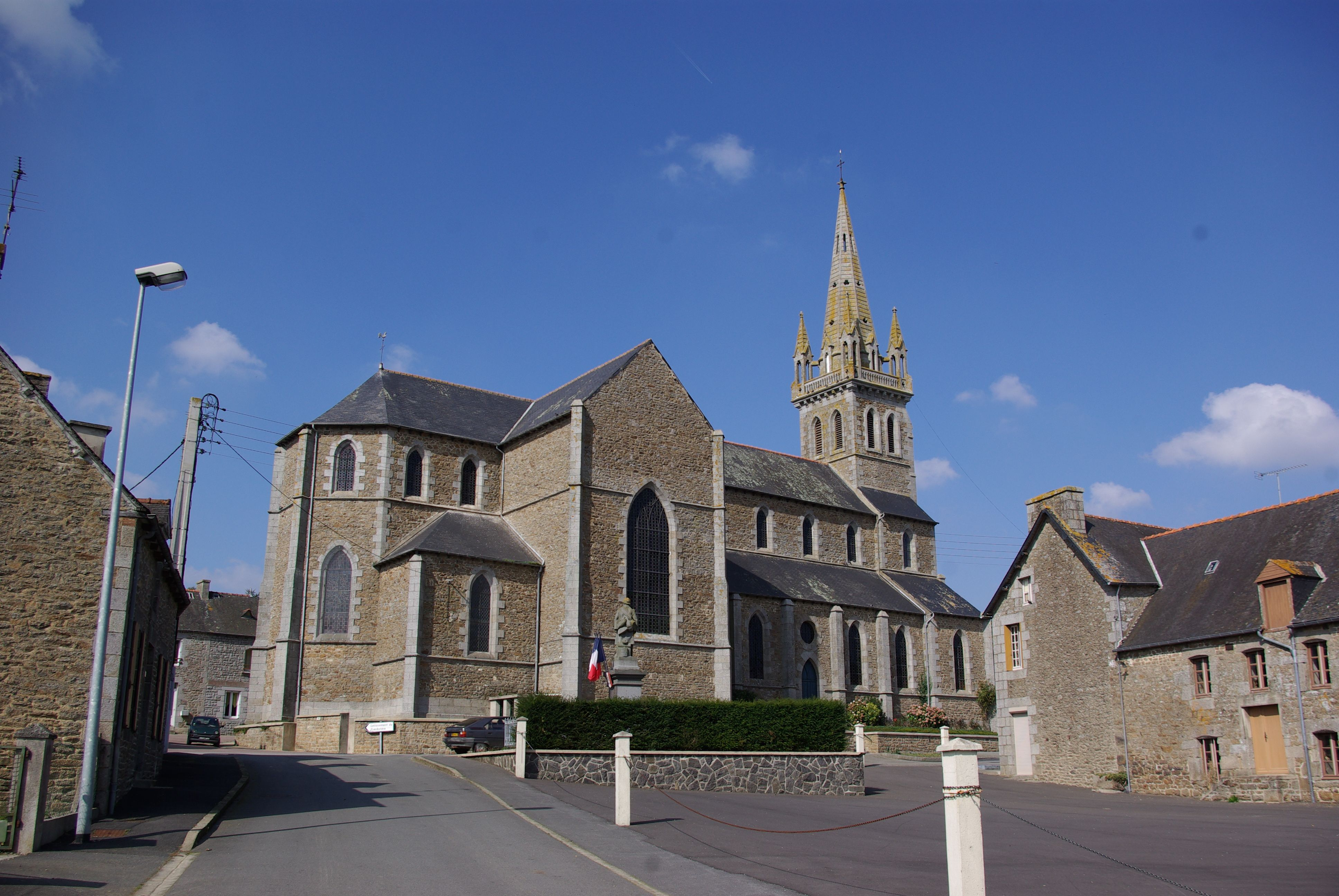 Le Gouray in der Bretagne, Frankreich, die Kirche (geotags in den EXIF-Daten).